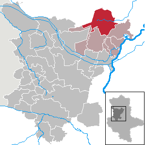 Burgstall in Saxony-Anhalt (Country) - District (Landkreis) Börde